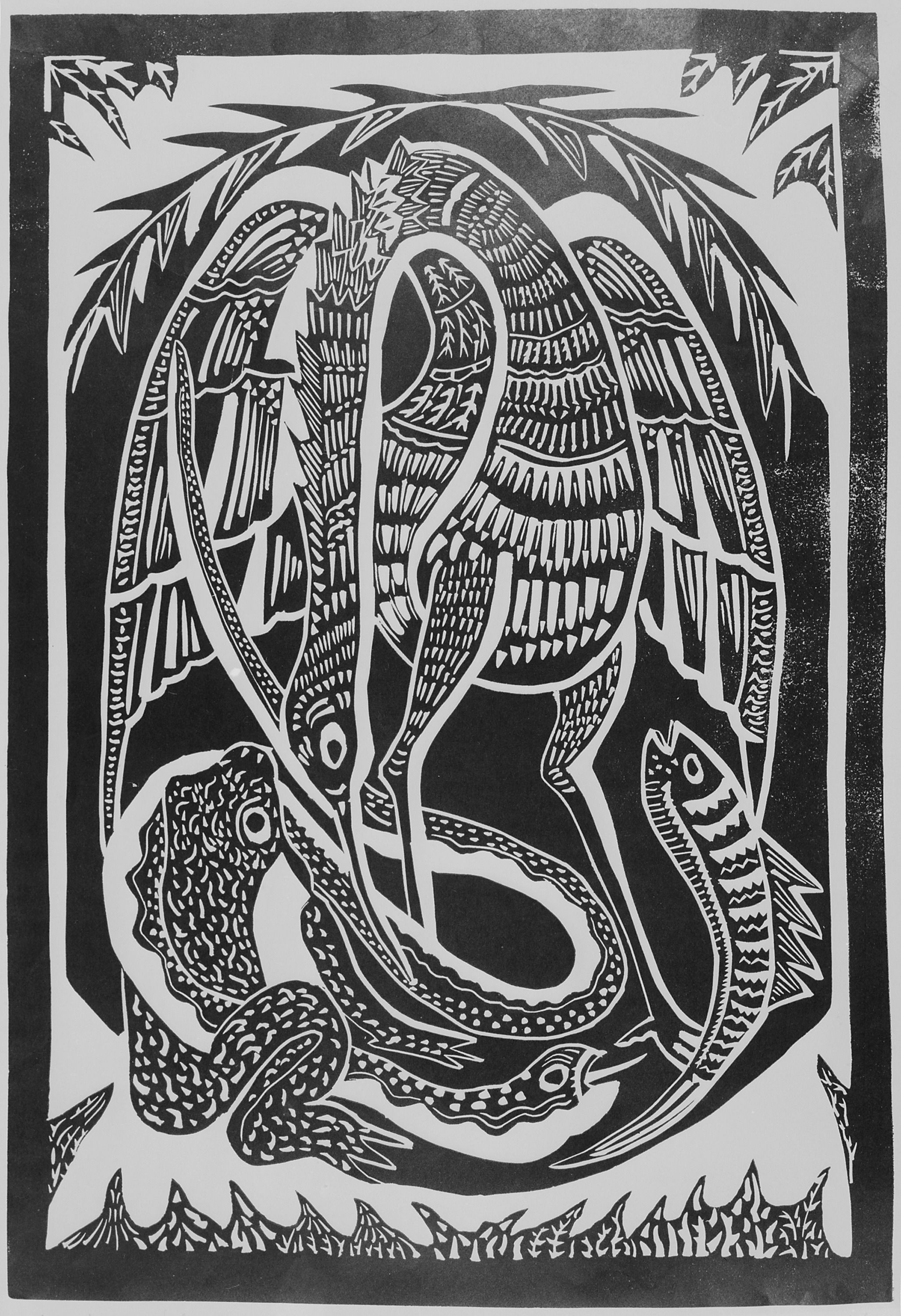 General notes: Linocut